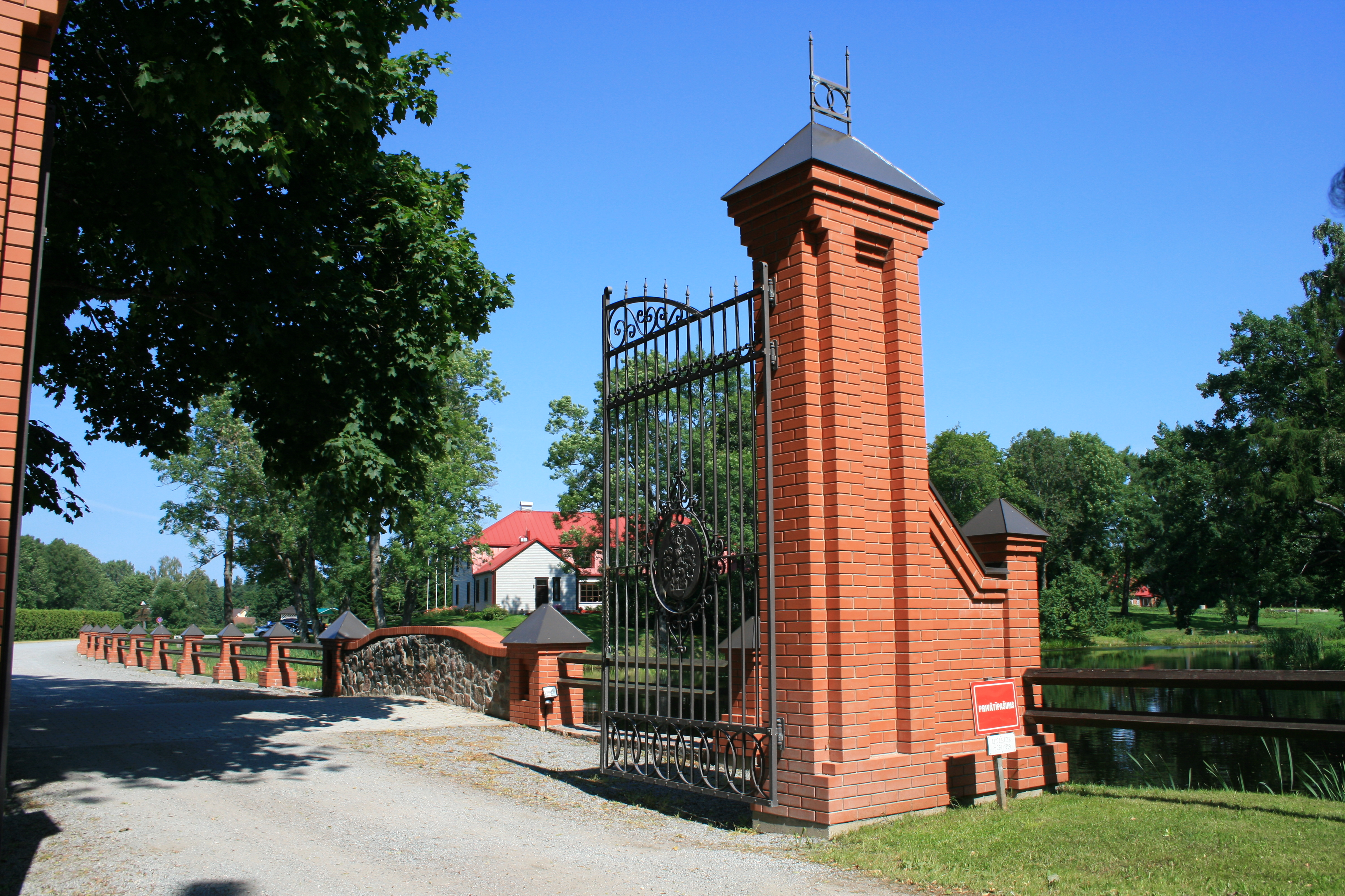 Minhauzena muzeja vārti Duntē